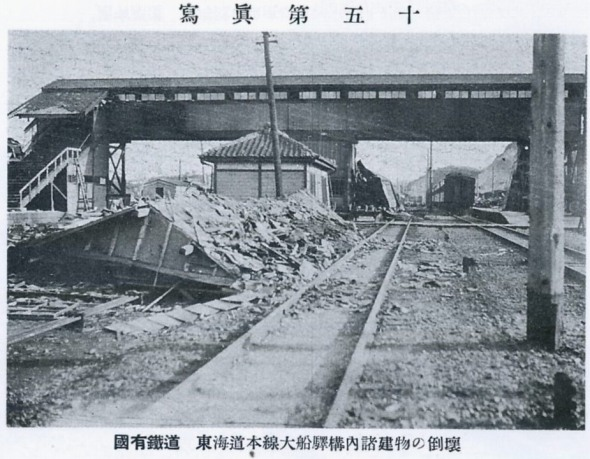 関東大震災で被災した大船駅。土木学会附属土木図書館デジタルアーカイブスで閲覧可能。